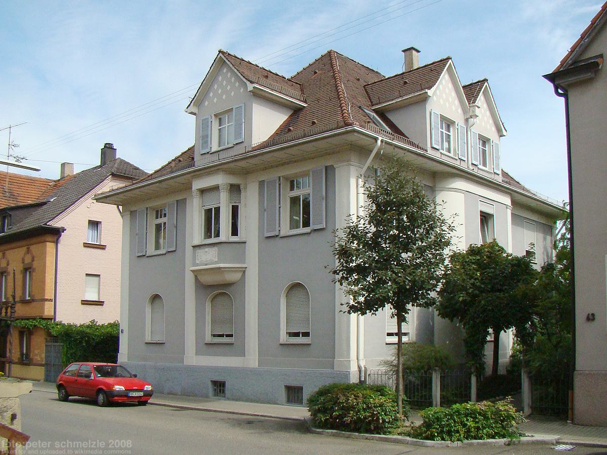 Denkmalgeschützte Gebäude Ludwigsburger Str. 61 in Heilbronn-Böckingen